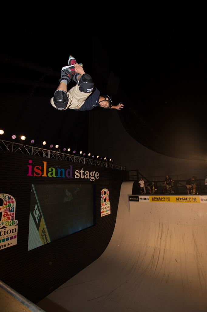 method air